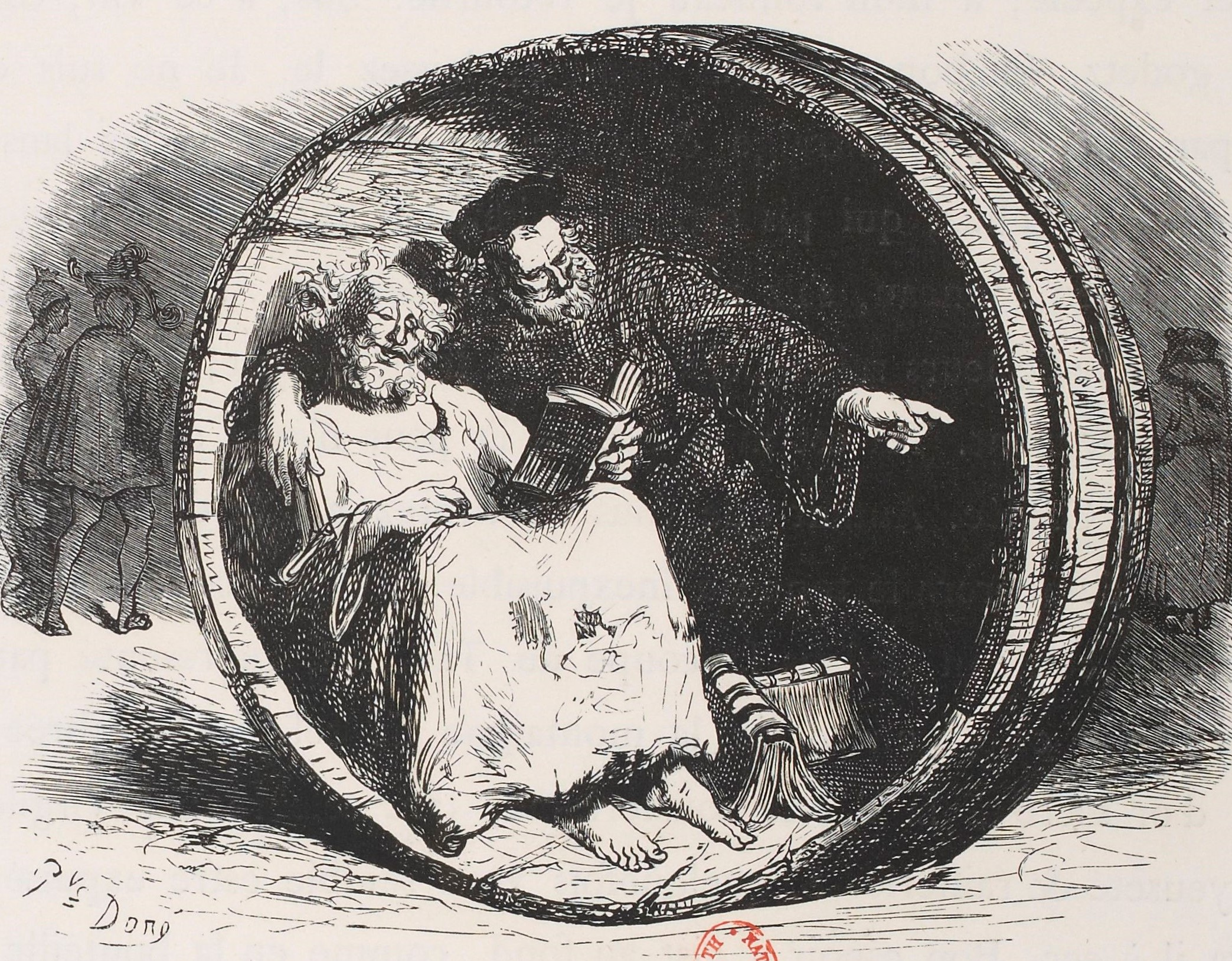 Le prologue du Tiers Livre de François Rabelais commence avec une évocation de l'activité du philosophe Diogène. Gravure de Gustave Doré du premier tome de l'édition des Œuvres de Rabelais en 1873 par l'éditeur Garnier Frères.